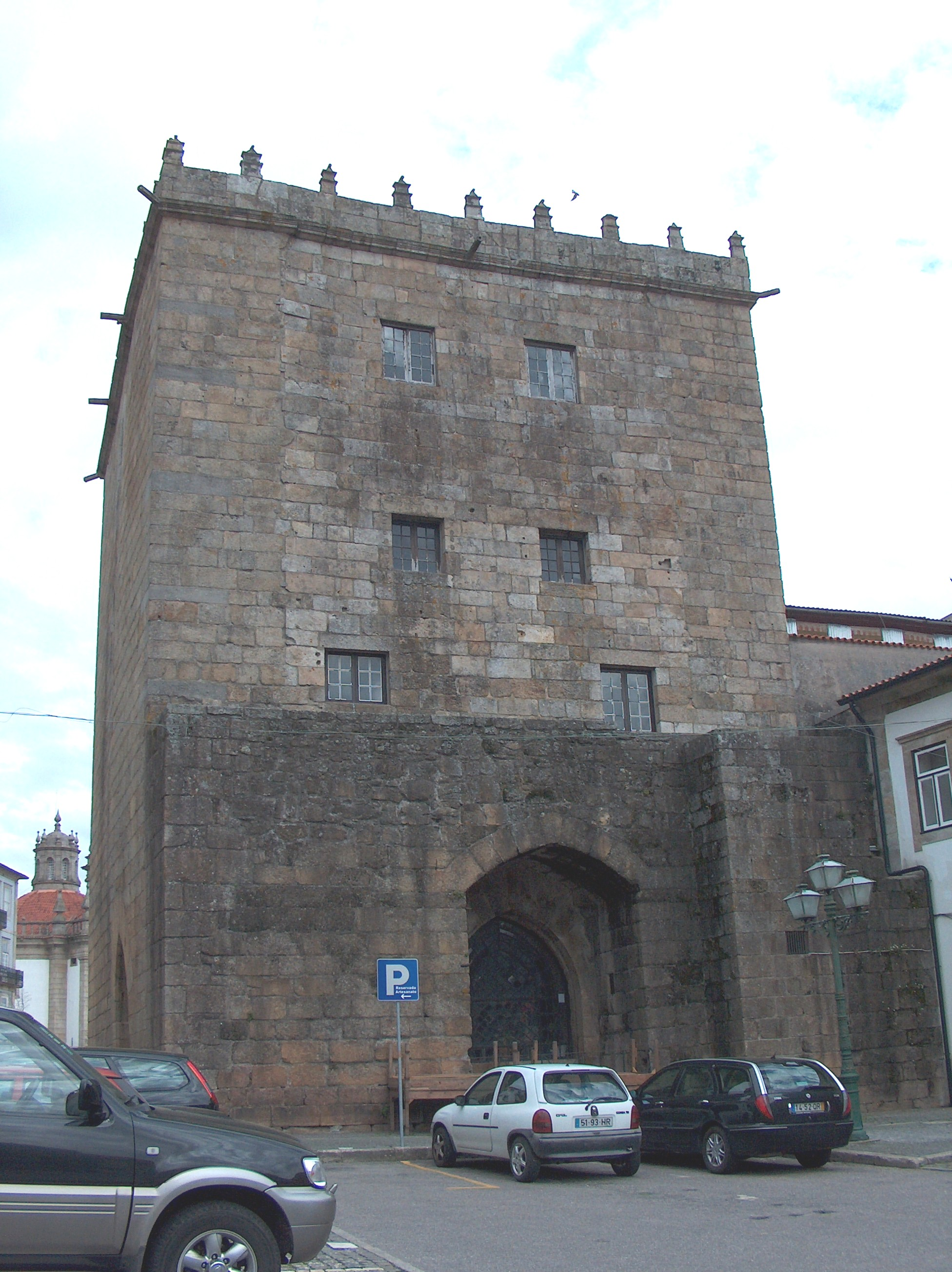 Torre do Cimo da Vila. Torre do Cimo da Vila, Barcelos, distrito de Braga, Portugal.